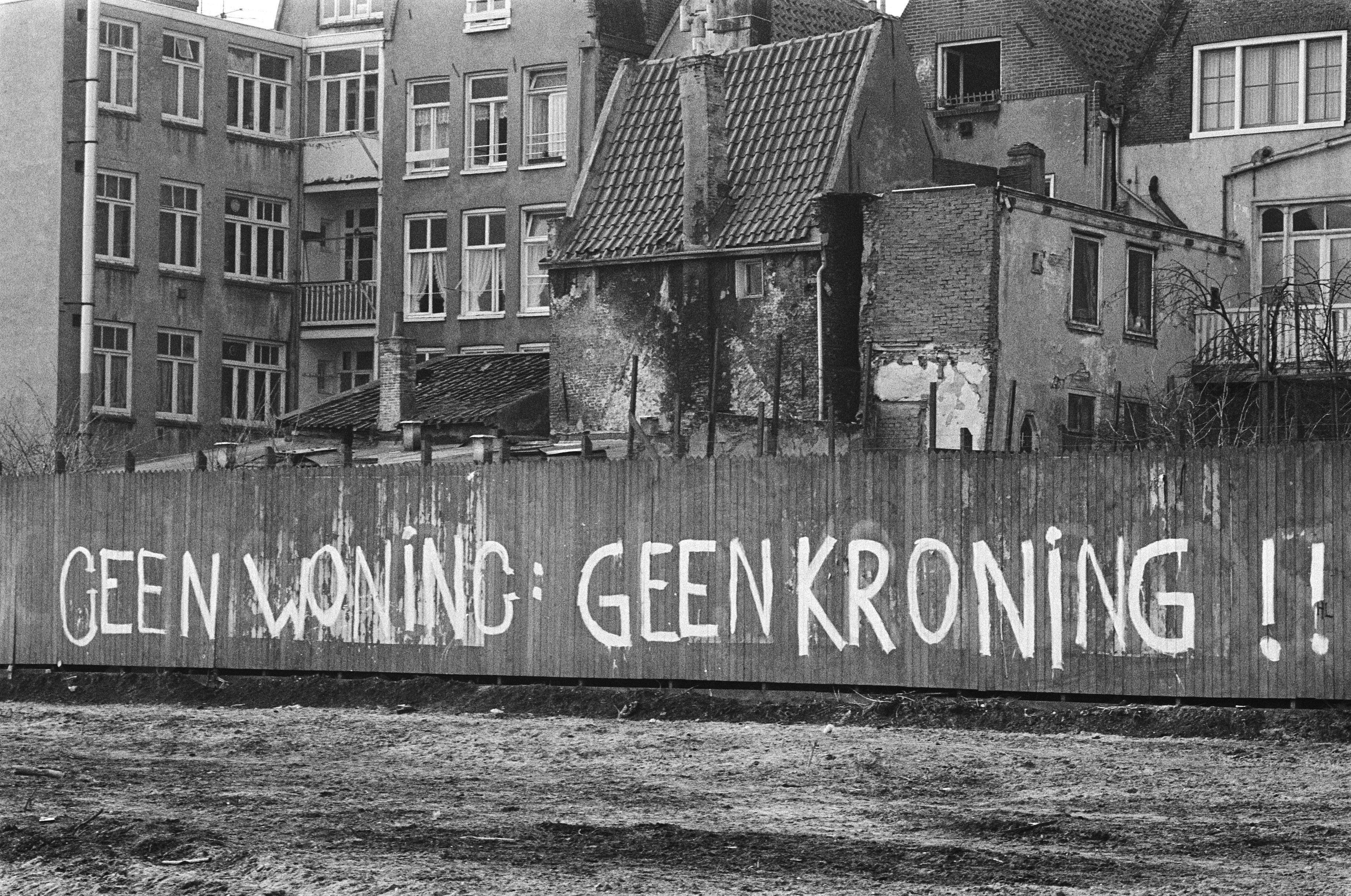 Collectie / Archief : Fotocollectie Anefo Reportage / Serie : [ onbekend ] Beschrijving : Tekst: "Geen woning, geen kroning" op schutting Haarlemmer Houttuinen Datum : 26 maart 1980 Locatie : Haarlem Trefwoorden : schuttingen, teksten, woningen Fotograaf : Suyk, Koen / Anefo Auteursrechthebbende : Nationaal Archief Materiaalsoort : Negatief (zwart/wit) Nummer archiefinventaris : bekijk toegang 2.24.01.05 Bestanddeelnummer : 930-7455